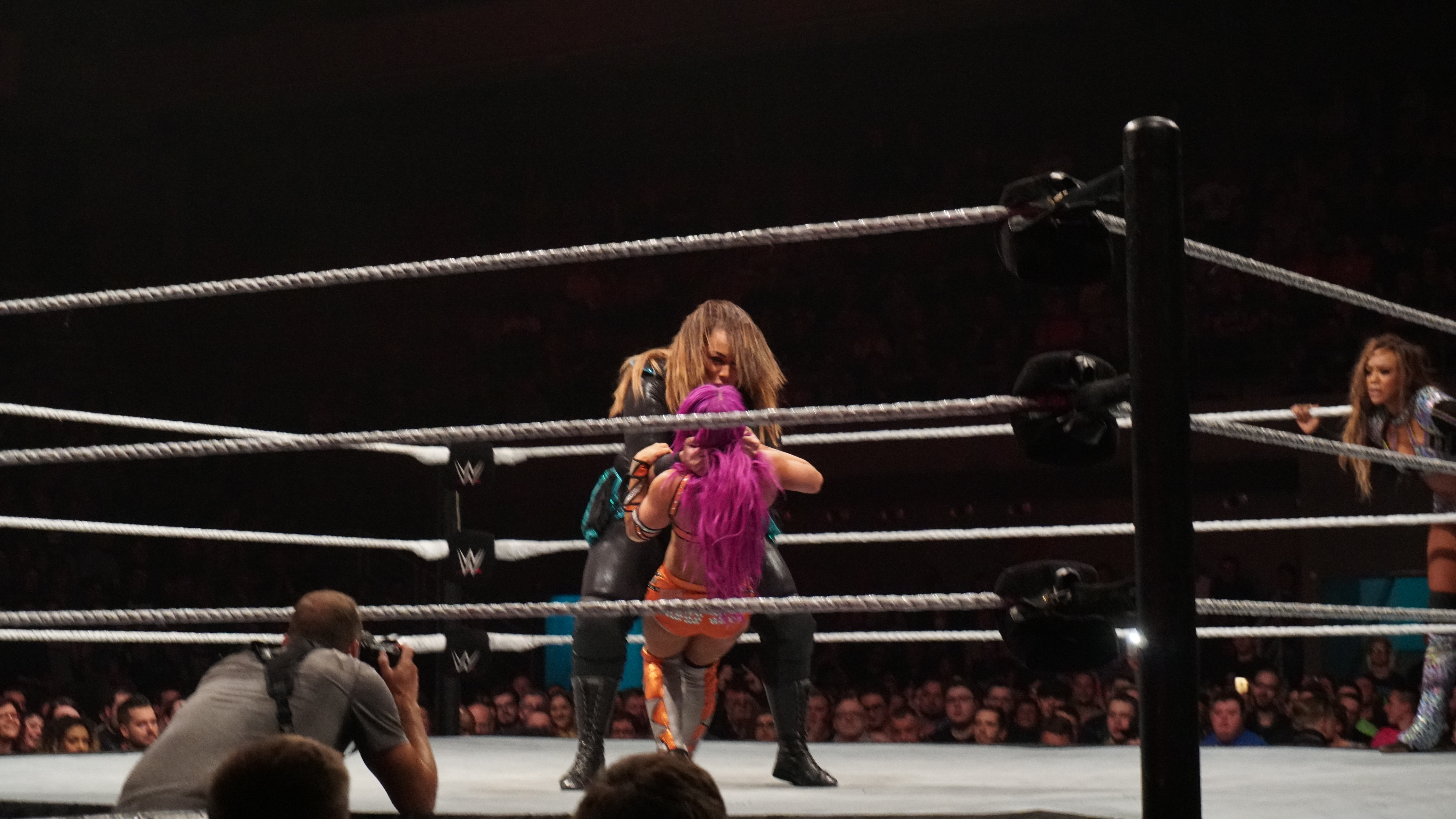 Dana Brooke & Sasha Banks defeat Alicia Fox & Nia Jax ( Le vendredi 12 mai, la WWE Live Tour fera escale au Country Hall a Liege pour le spectacle de catch de l'annee! Au programme: des duels impitoyables et des rencontres captivantes entre les meilleures equipes et les plus grands rivaux. )